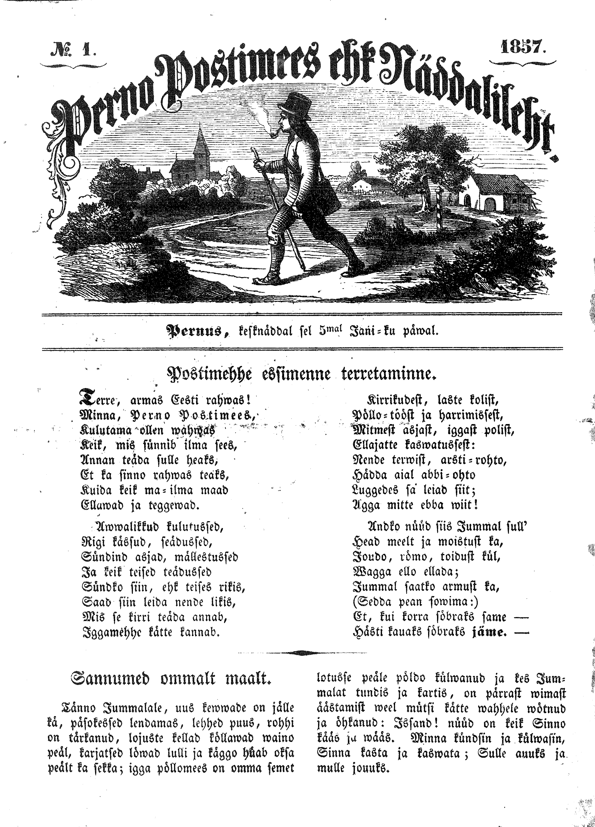 Perno Postimees ehk Näddalileht, esinumbri esileht